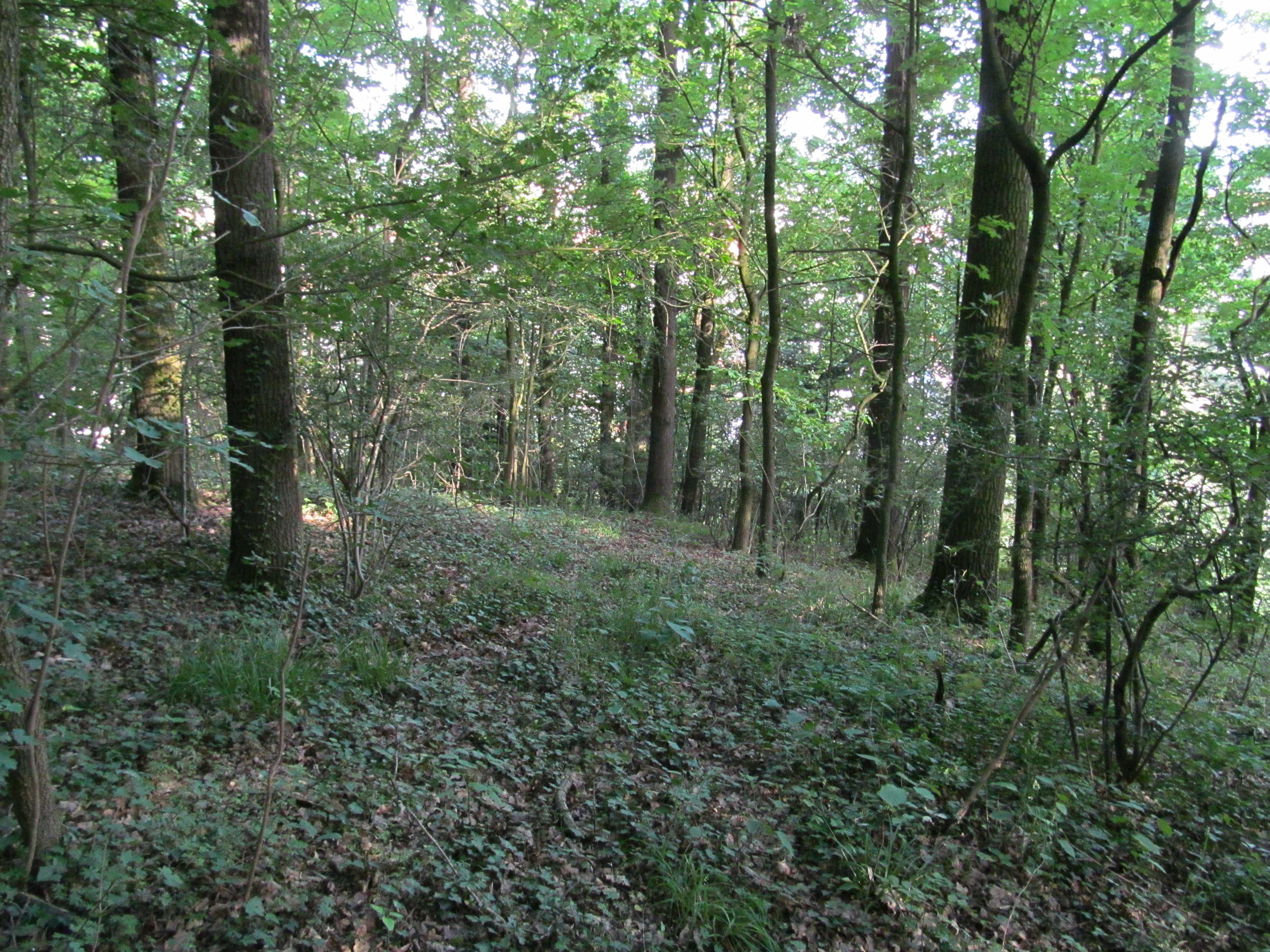 der Wald nördlich von Niederkaufungen gehört zum FFH-Gebiet Wald nördlich Niederkaufungen